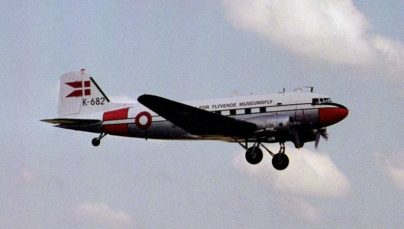 DC-3